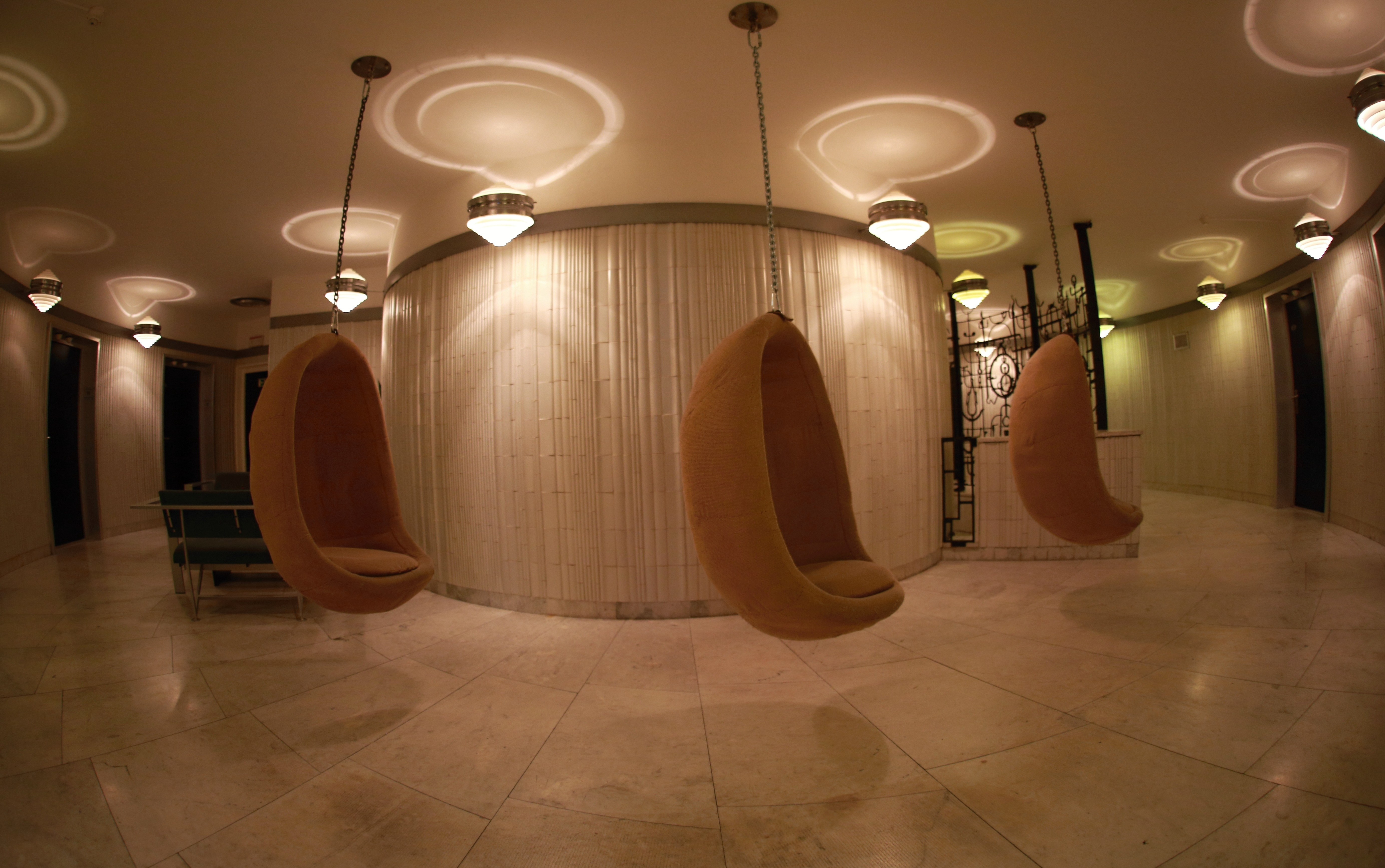 Hotel Ještěd - chodba k pokojům